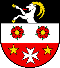 Wappen von Vernay Kanton Freiburg Schweiz